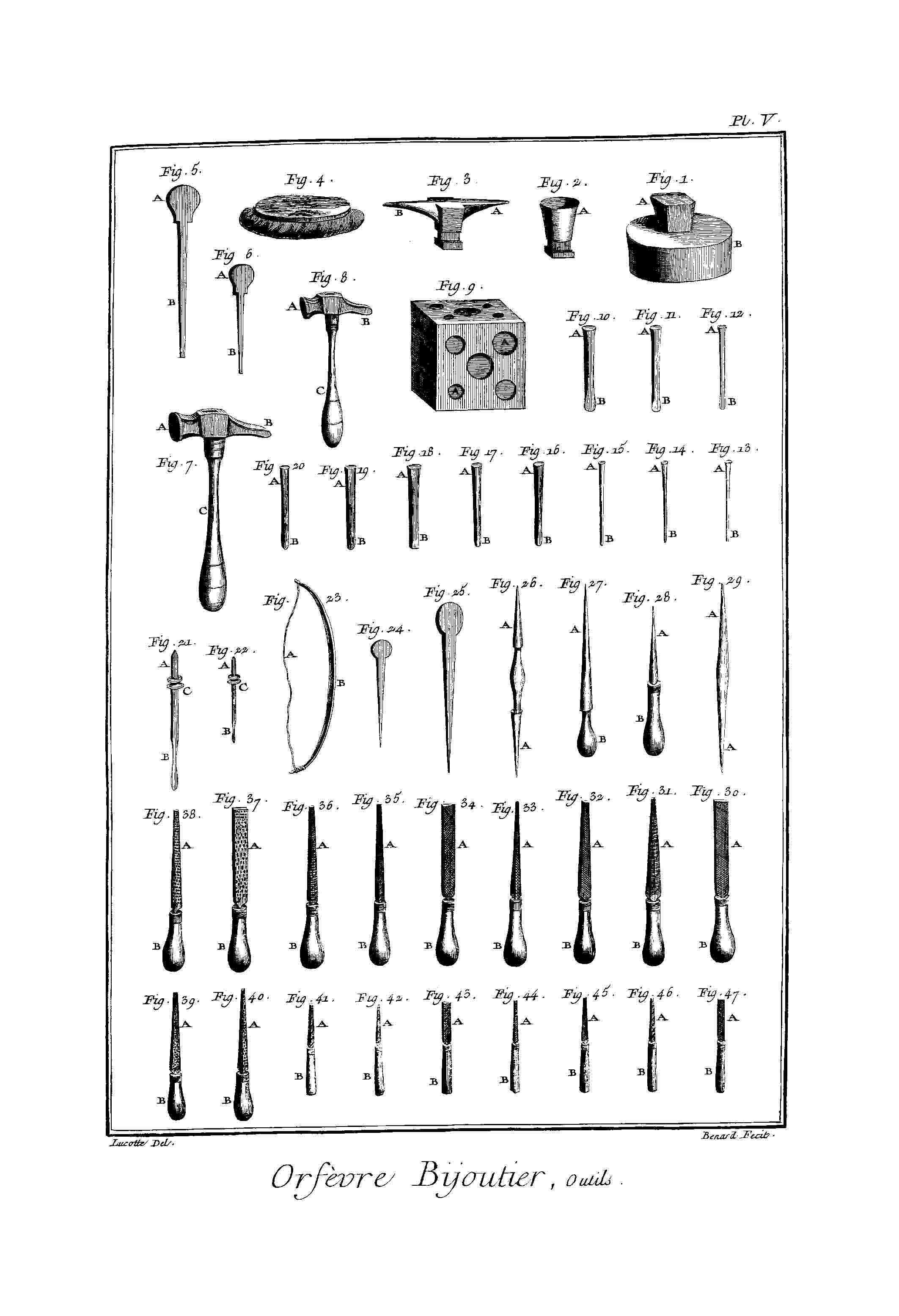 orfèvre 24: orfèvre bijoutier, outils